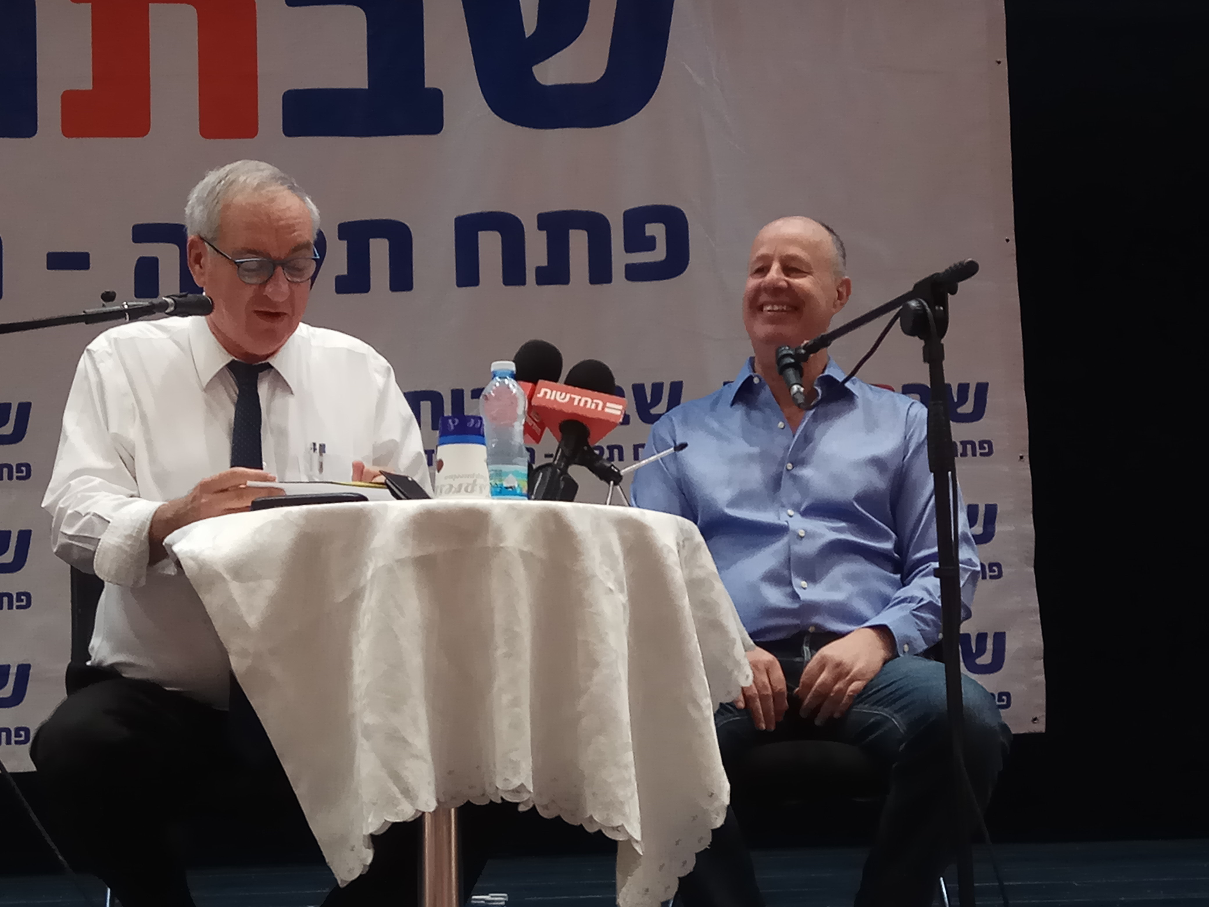 צחי הנגבי באירוע שבתרבות בפתח תקווה עם משה נסטלבאום